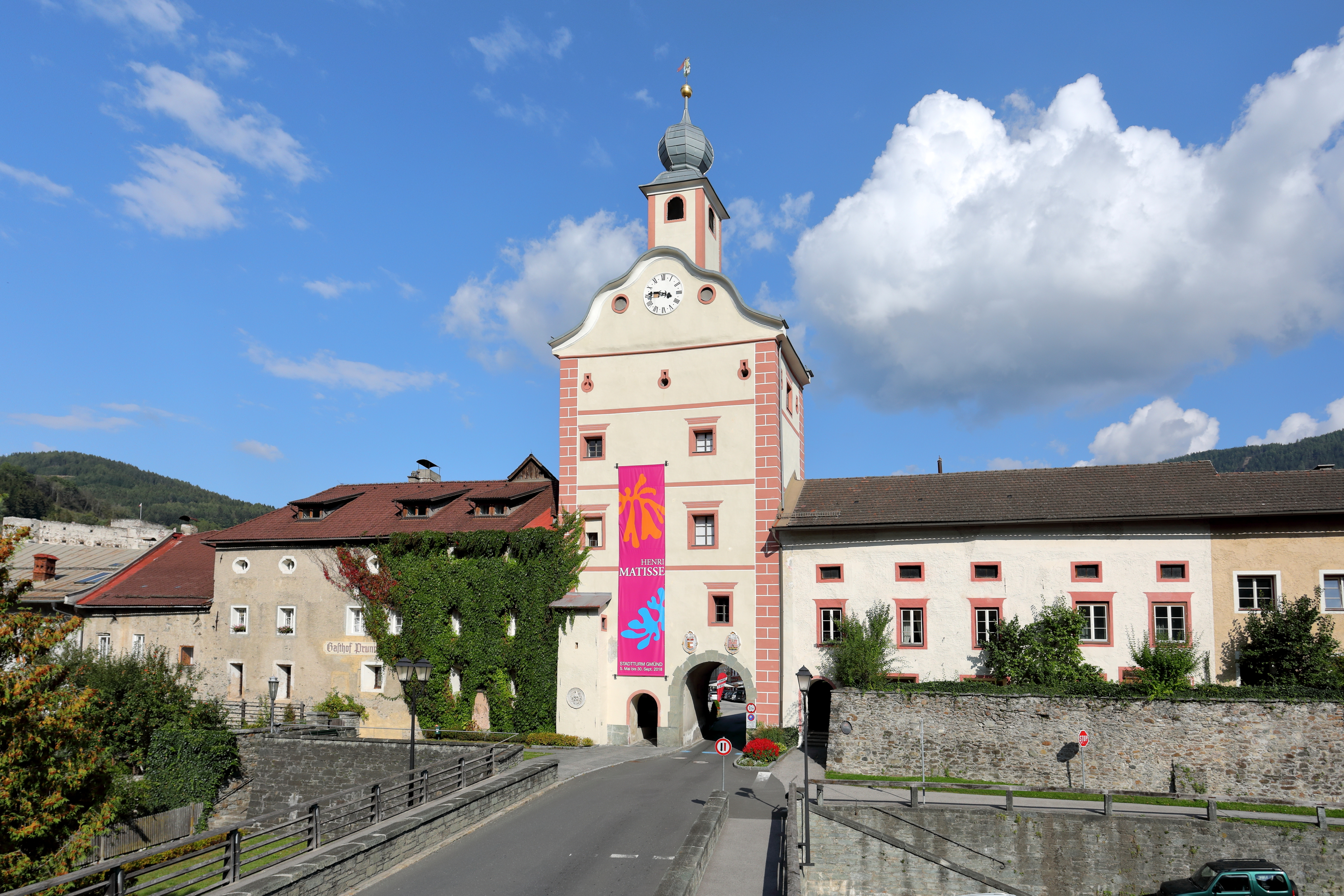 Das Untere Stadttor der Stadtgemeinde Gmünd in Kärnten.Das Untere Stadttor ist ein viergeschossiger Torturm mit einer tonnengewölbten Durchfahrt aus dem beginnenden 16. Jahrhundert. Der geschwungene Giebel und der Dachreiter mit Zwiebelhelm wurden Ende des 17. Jahrhunderts hinzugefügt.